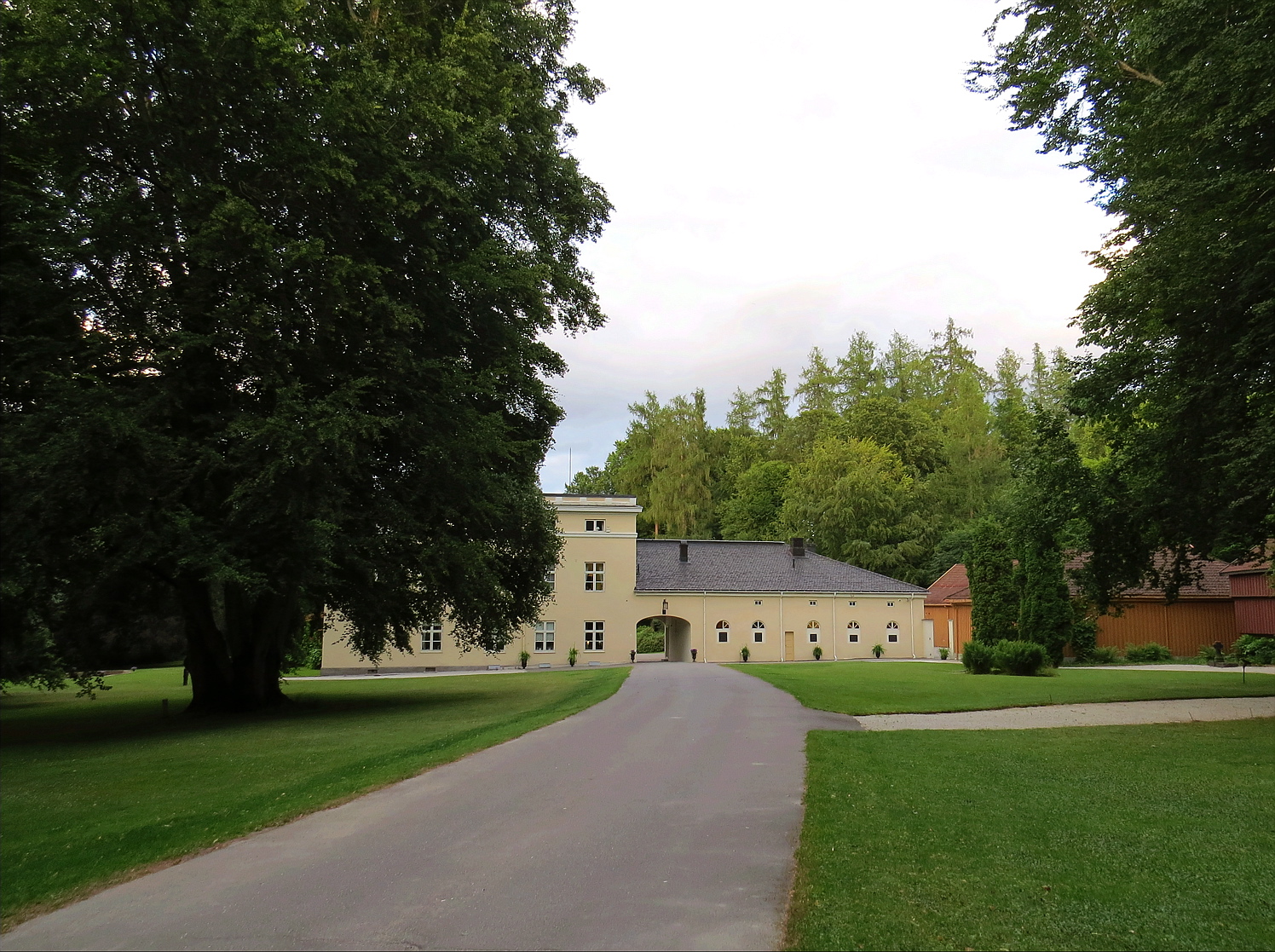 Holden, Ulefoss, Norge